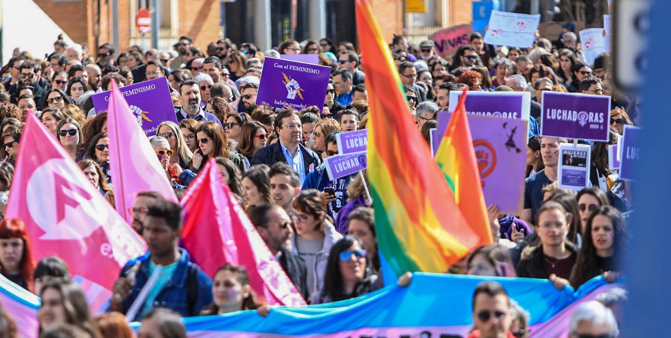 Reivindicaciones 8M